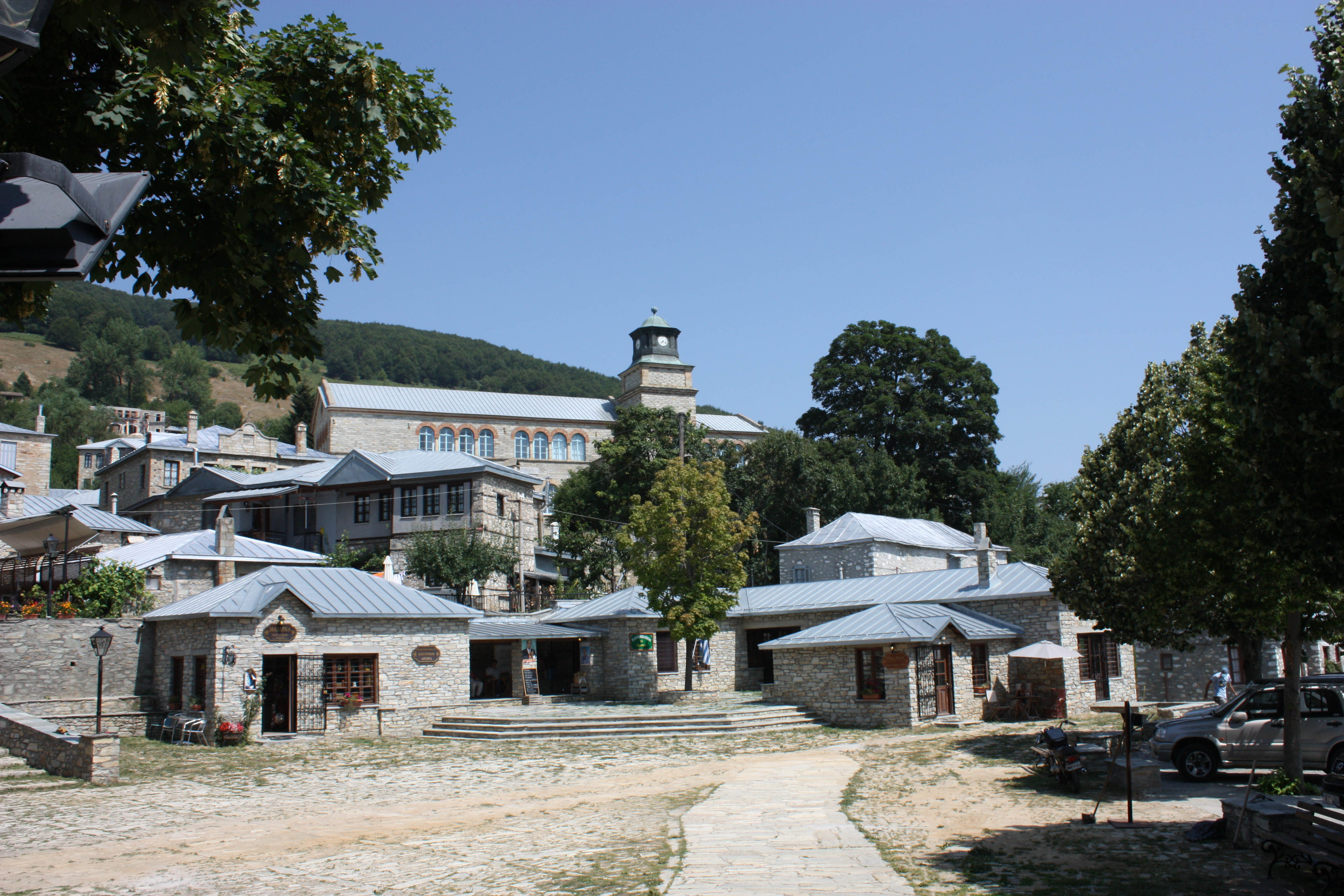 Νυμφαίο Φλώρινας«Νυμφαίο Φλώρινας»